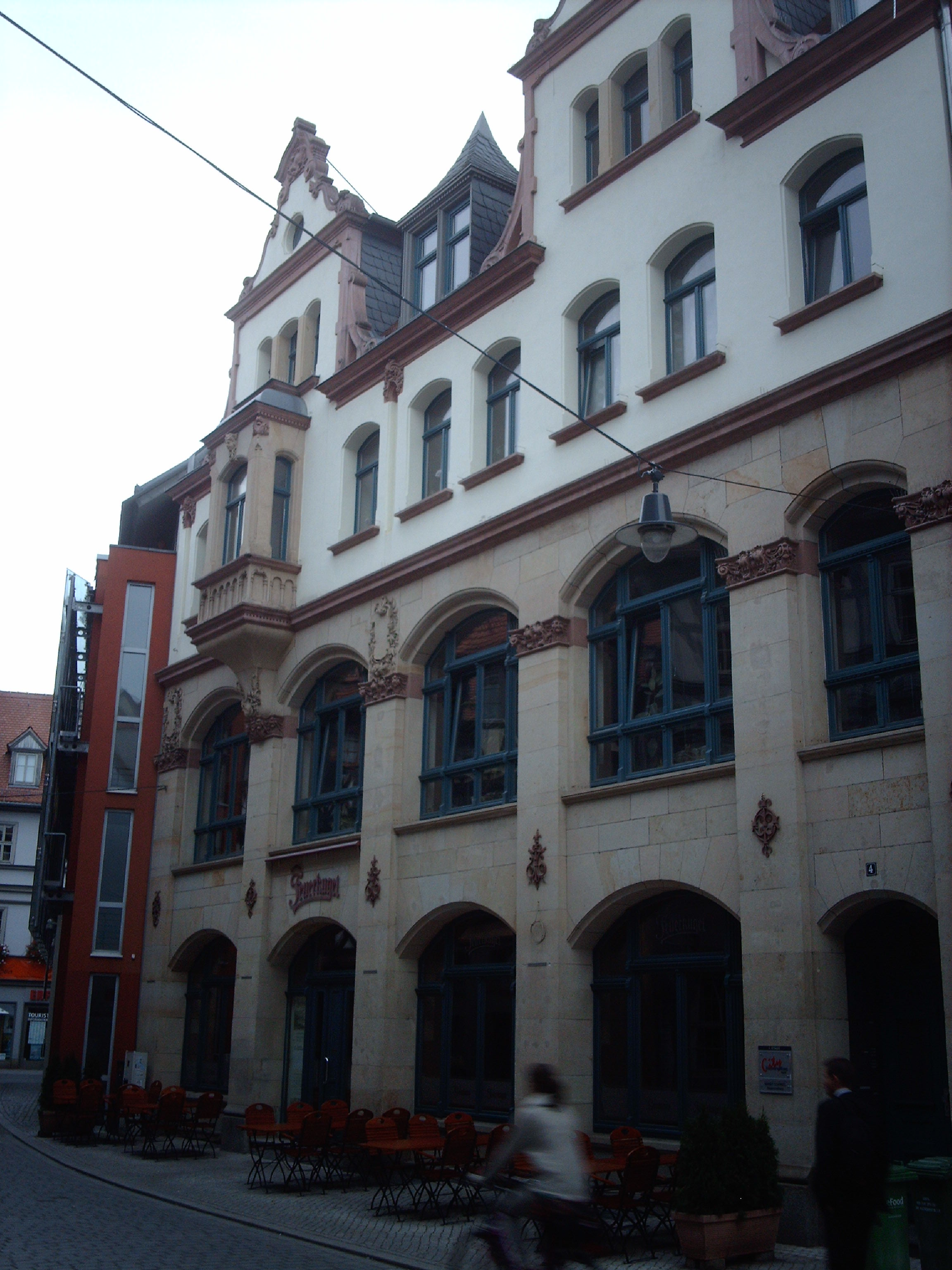 Gasthaus Feuerkugel in der Michaelisstraße 1-3, Erfurt